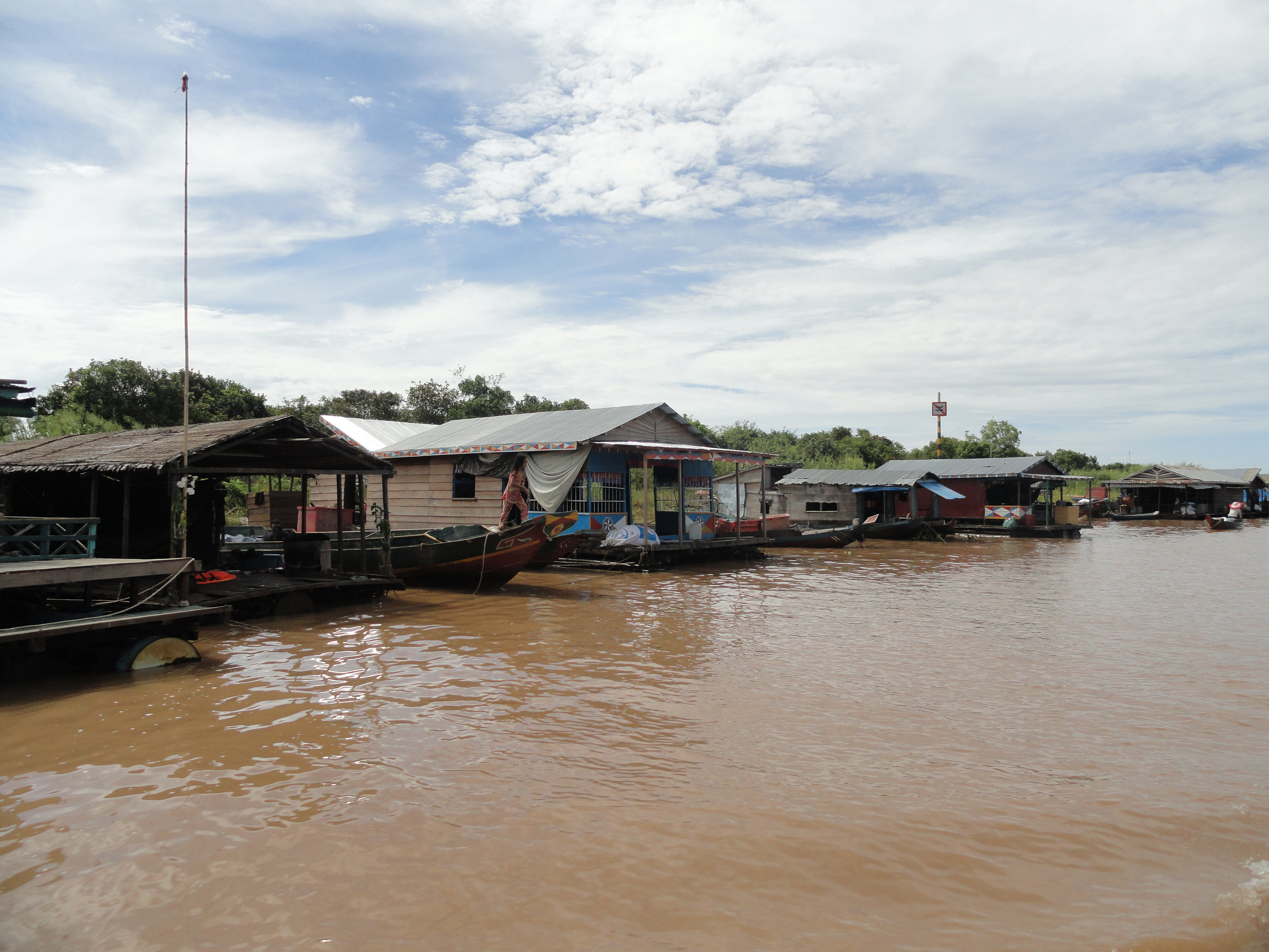 中文（中国大陆）: 在柬埔寨洞里萨湖上拍摄的船屋